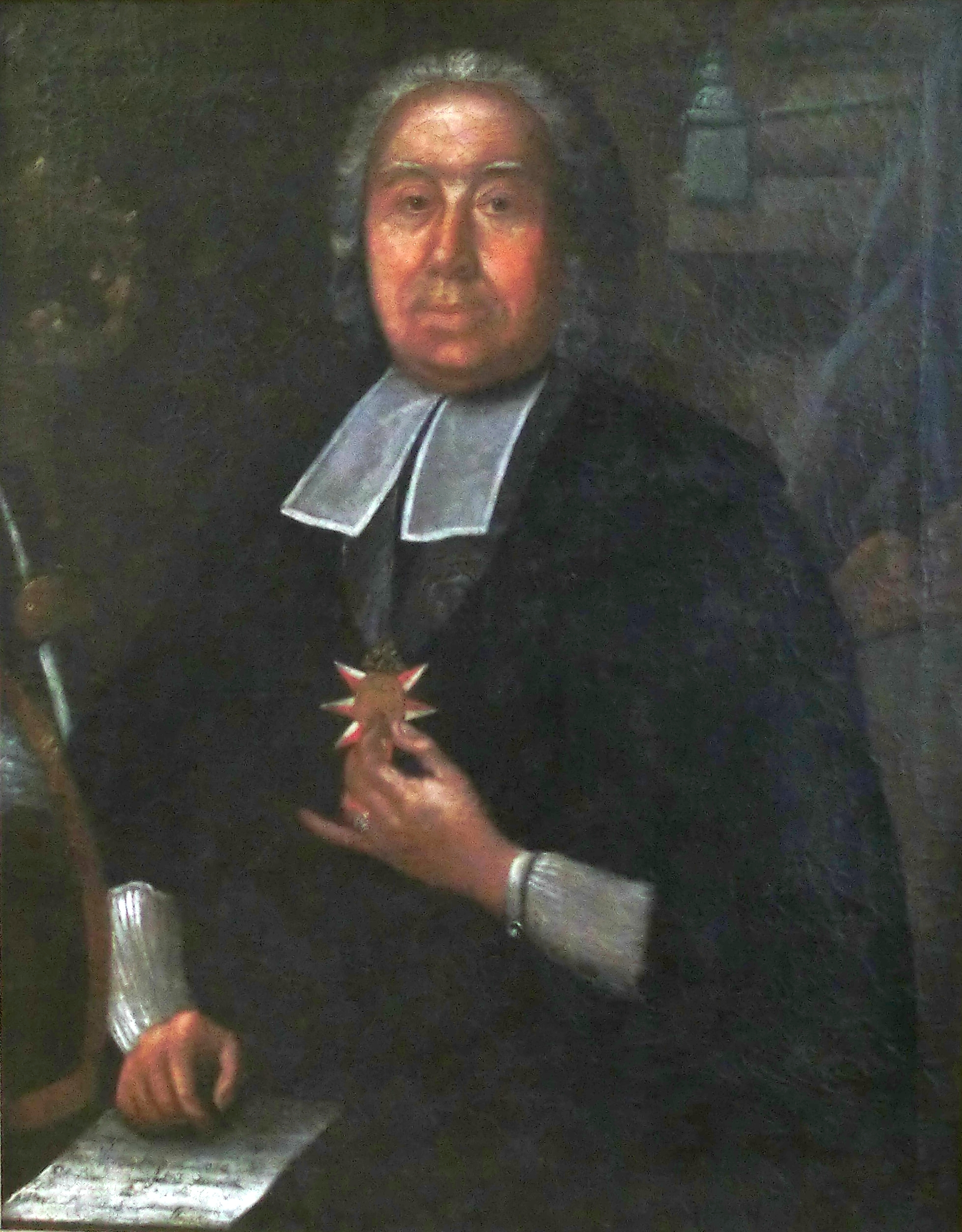 Kanovník Jan Václav Regner z Kličína, kolem roku 1762